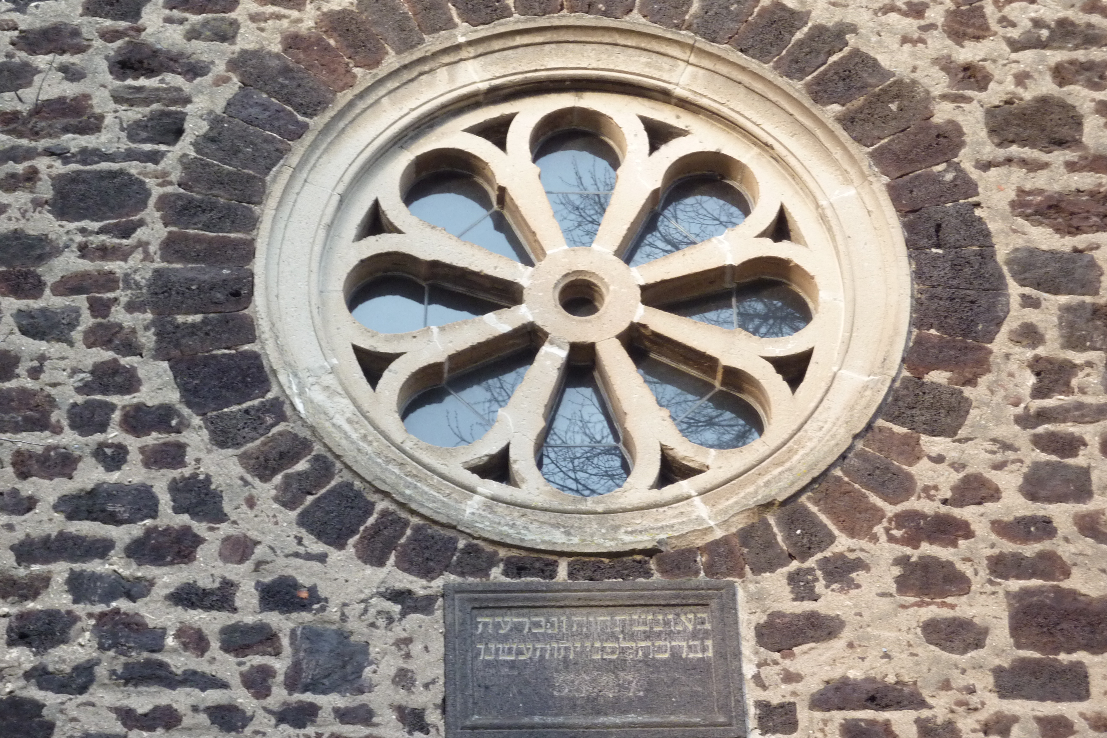 Synagoge (Polch)